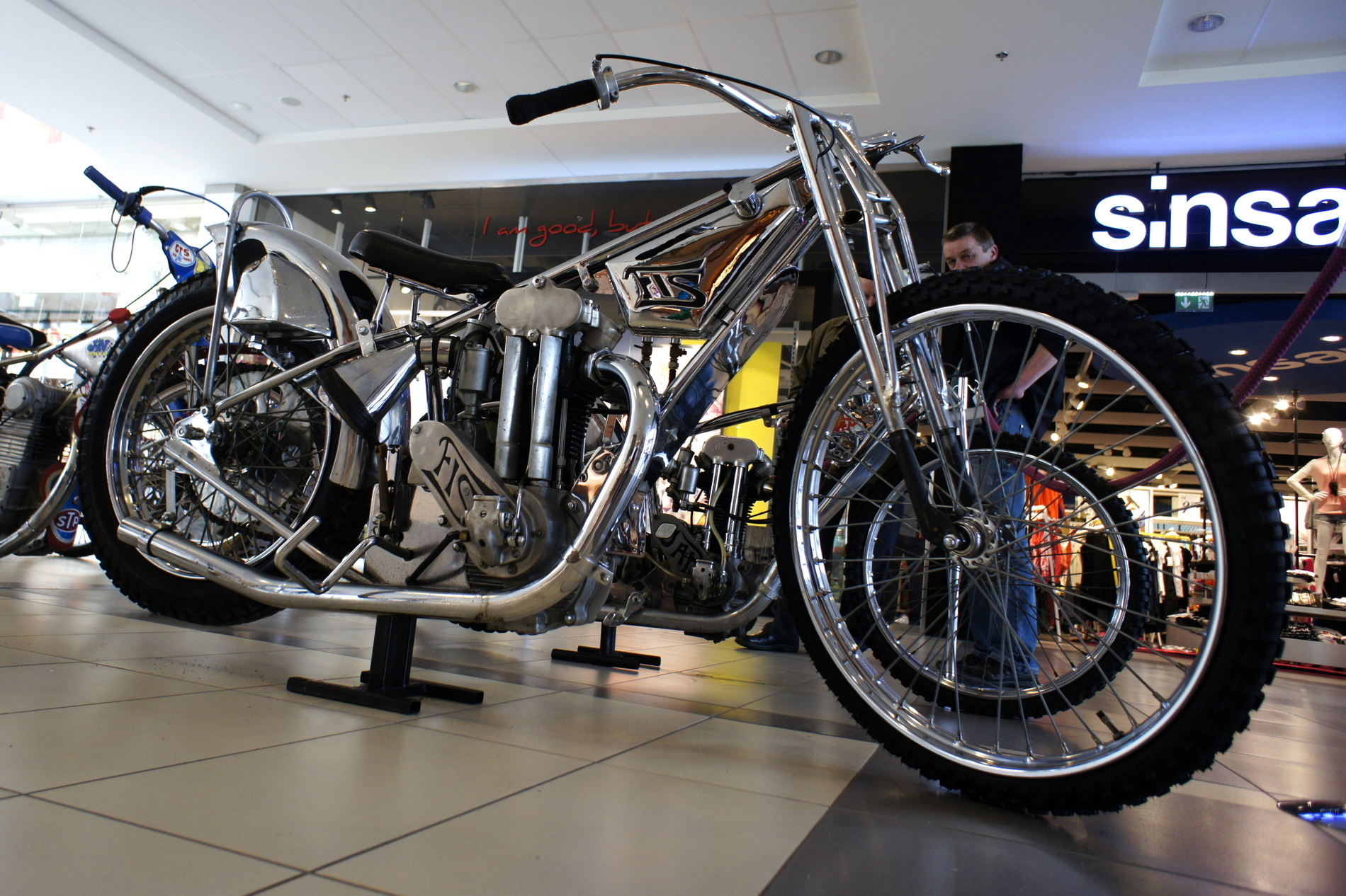 WSK FIS, unikatowy egzemplarz z 1956 r. z kolekcji Macieja Gralaka